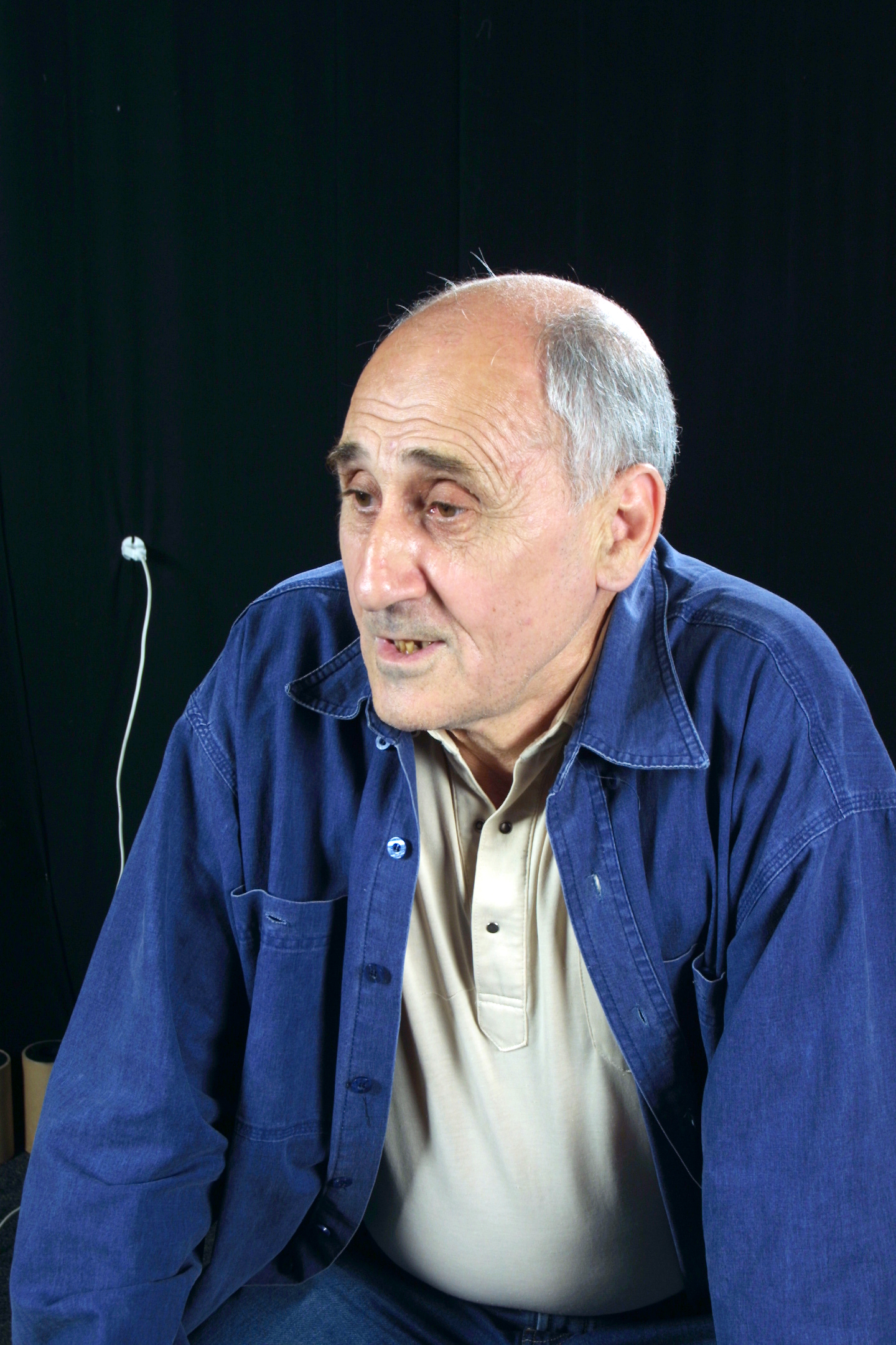 Мейланов, Вазиф Сиражутдинович